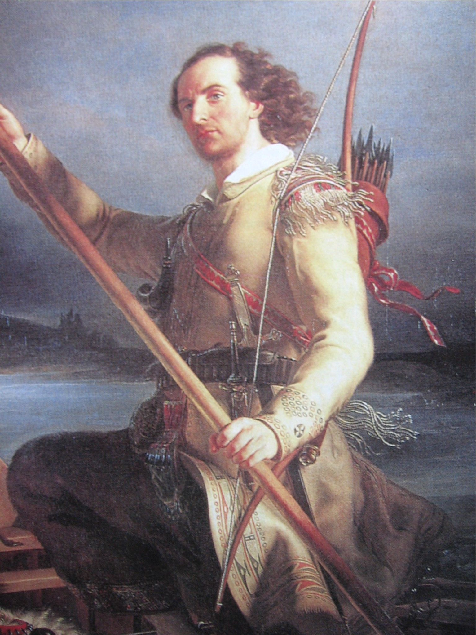 Portrait of Giacomo Costantino Beltrami